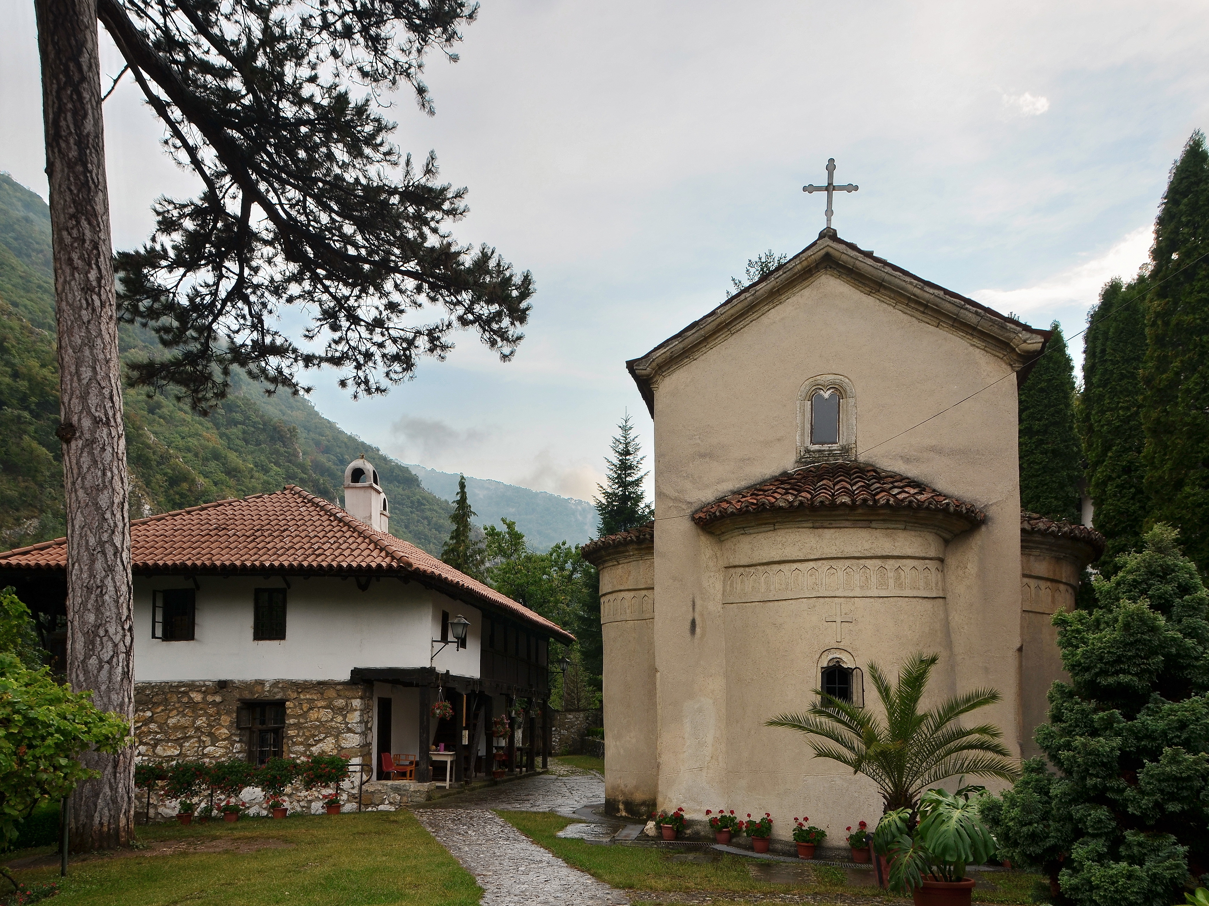 Никоље је имало значајну улогу у време Другог српског устанка, када је овде боравио Милош Обреновић са породицом, кријући се од Турака. У знак захвалности, он је 1817. године подигао велики конак и богато даривао манастир.